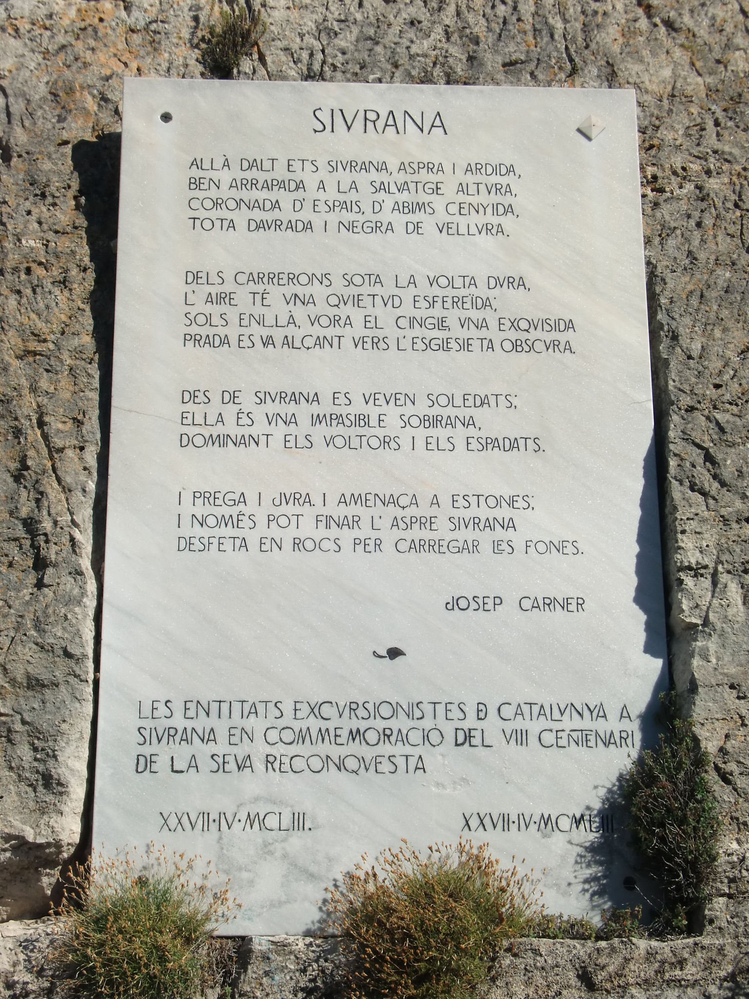 Llosa de marbre amb el poema "Siurana" de Josep Carner i Puig-Oriol a Siurana (el Priorat)